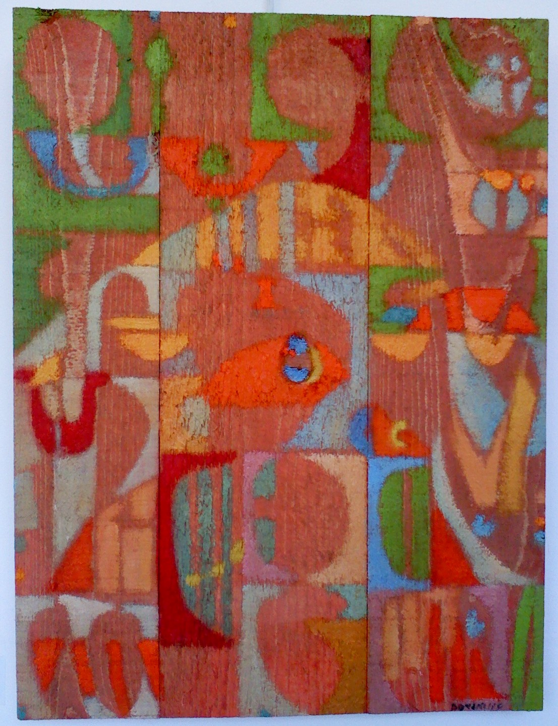 Dernière œuvre du peintre Joe Downing